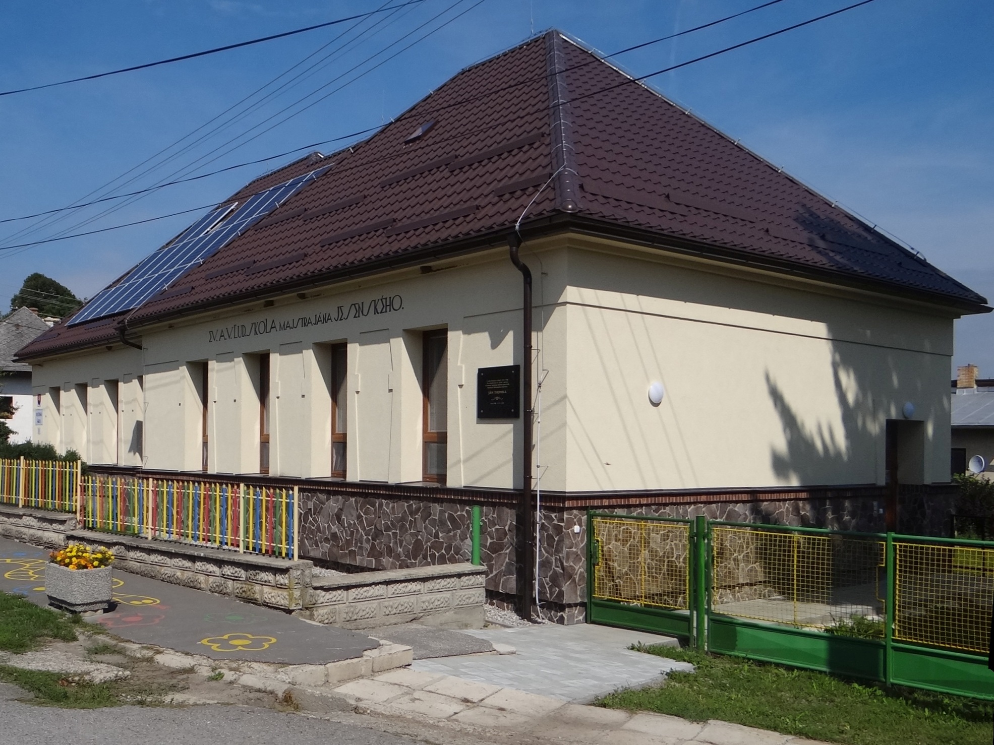 Sklabiňa